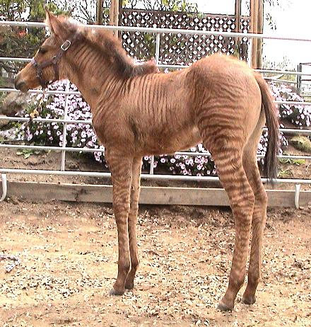 Zorse